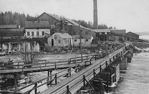 Jössefors bruk